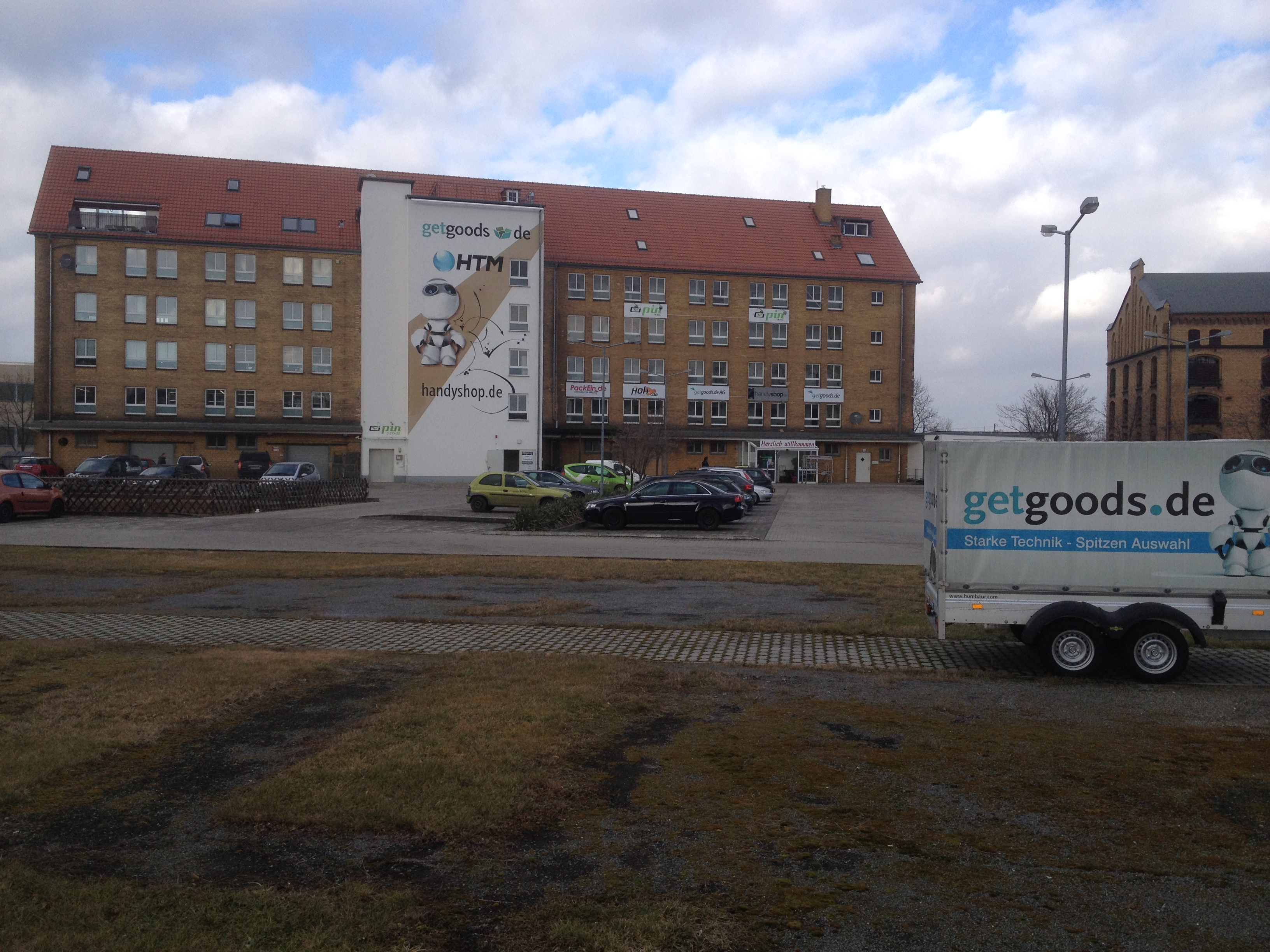 Gebäude der Firma getgoods.de in Frankfurt (Oder), Brandenburg, Deutschland